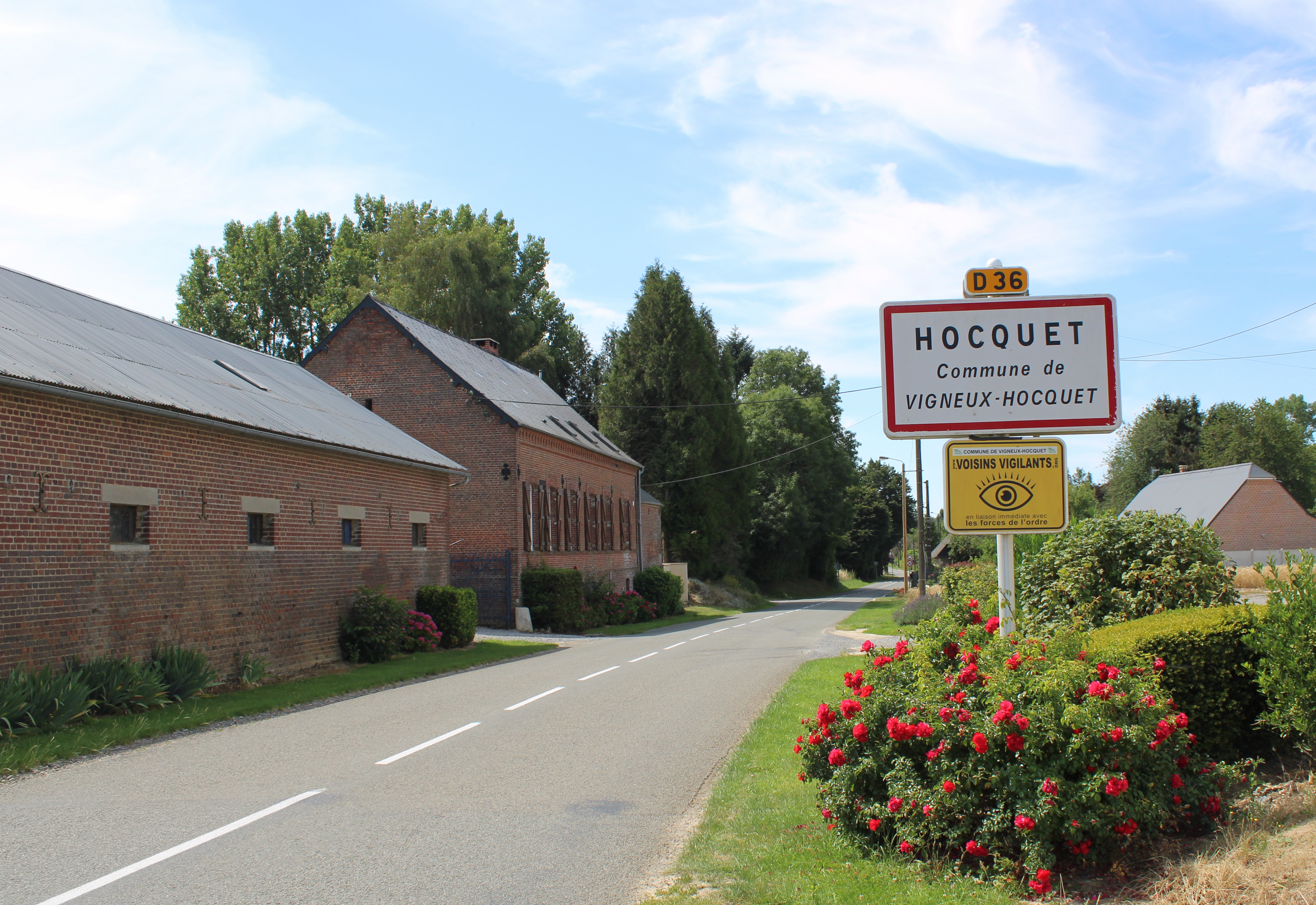 Entrée du hameau de Hocquet